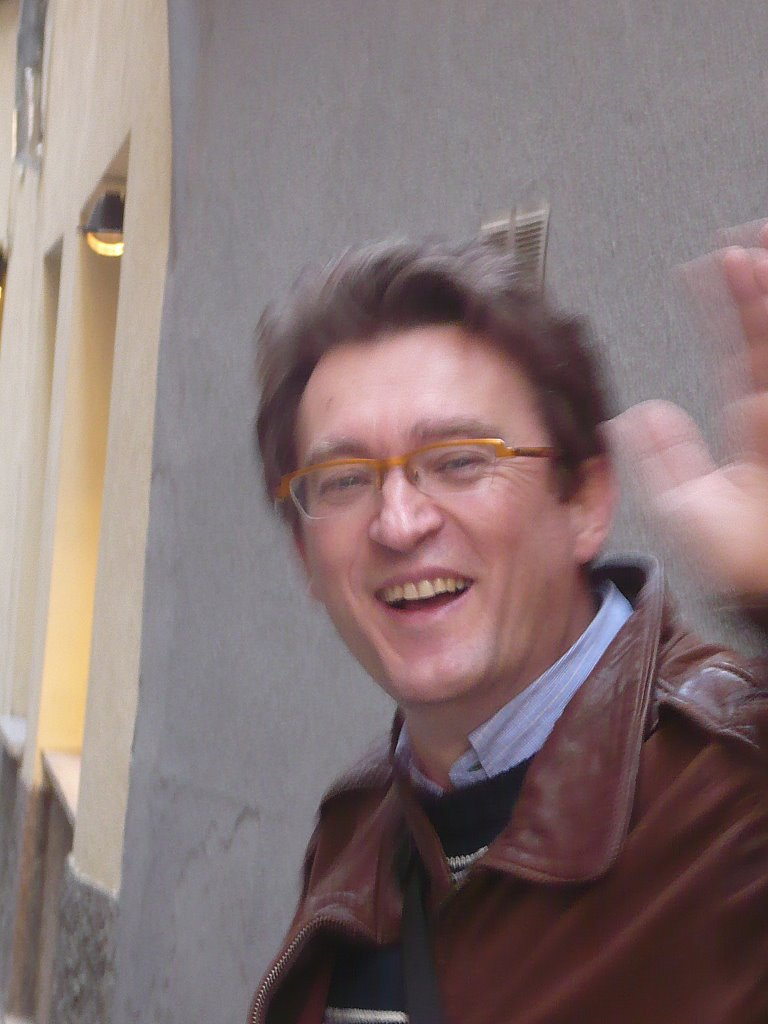 Fotografía tomada a Massimo Desiato por Fernanda Guevara en compañía de Rayda Guzmán. Paseando por Girona.